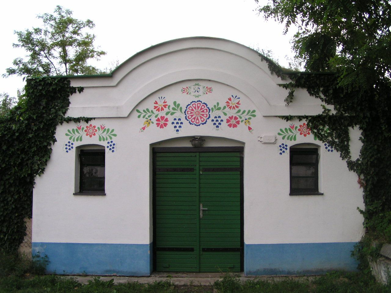 Vinný sklípek v Plžích